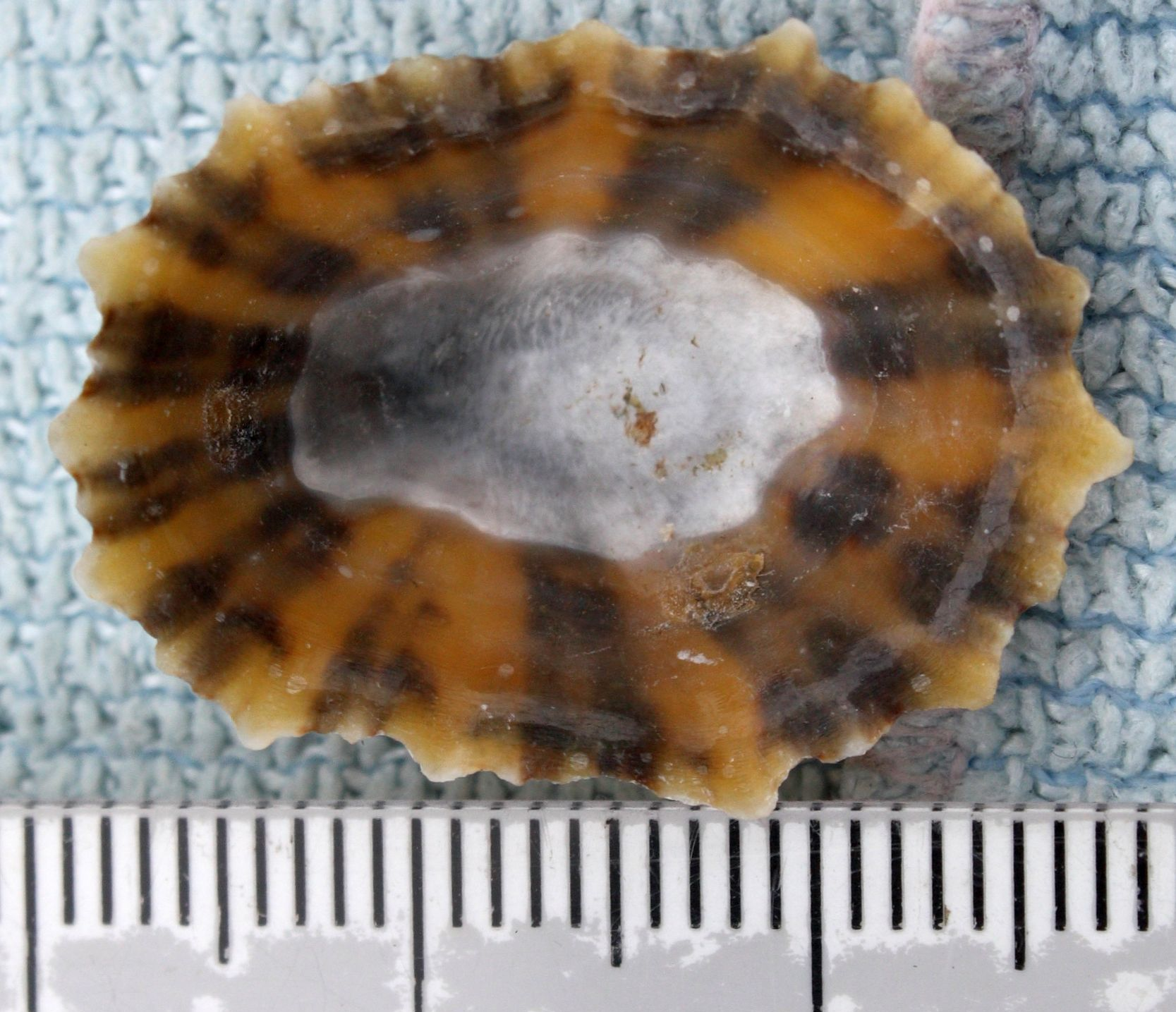 Albuesnegl Patella vulgata underside